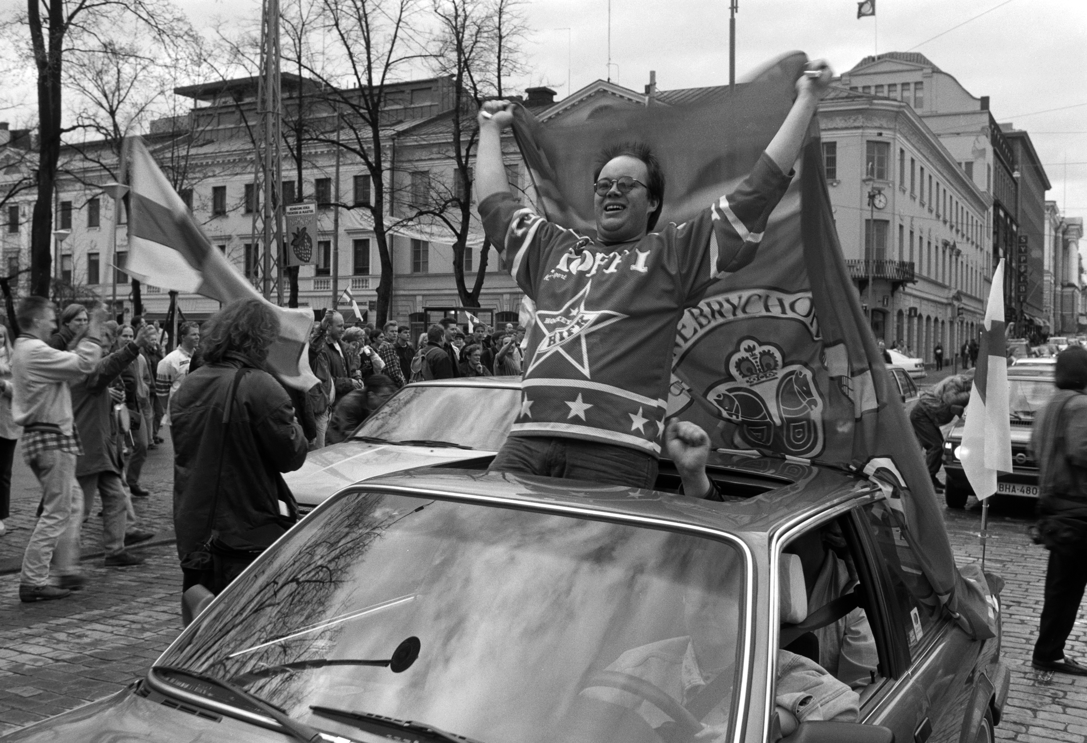 Jääkiekon maailmanmestaruusriehaa Esplanadilla noin tunti finaalin päättymisen jälkeen toukokuussa 1995.